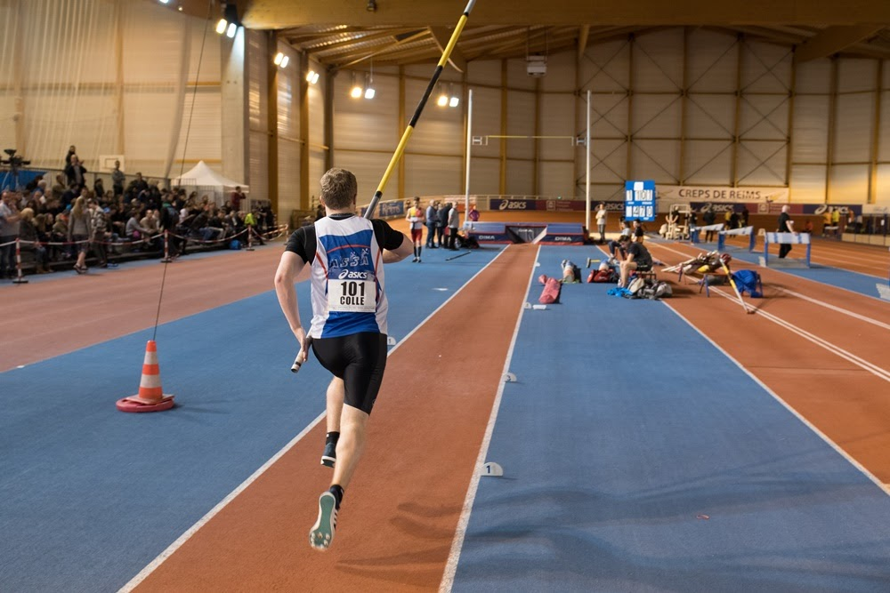 Concours du saut à la perche lors du Meeting National des Sacres - 2017